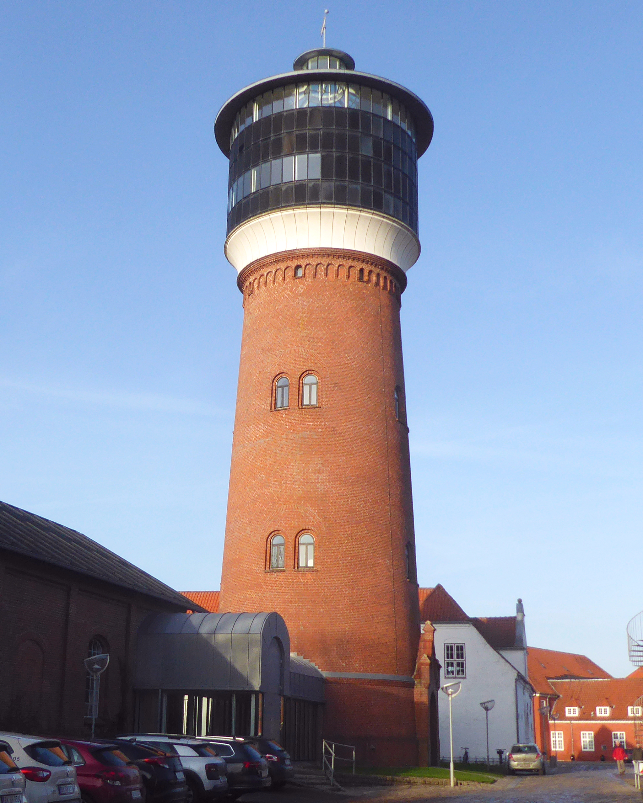 Wasserturm von Tondern Jütland aus dem Baujahr 1902 mit einer Höhe von 40 Metern und einer seinerzeitigen maximalen Wasserkapazität von 250 cbm - Tønder Vandtårn Syddanmark - Foto Wolfgang Pehlemann P1350658